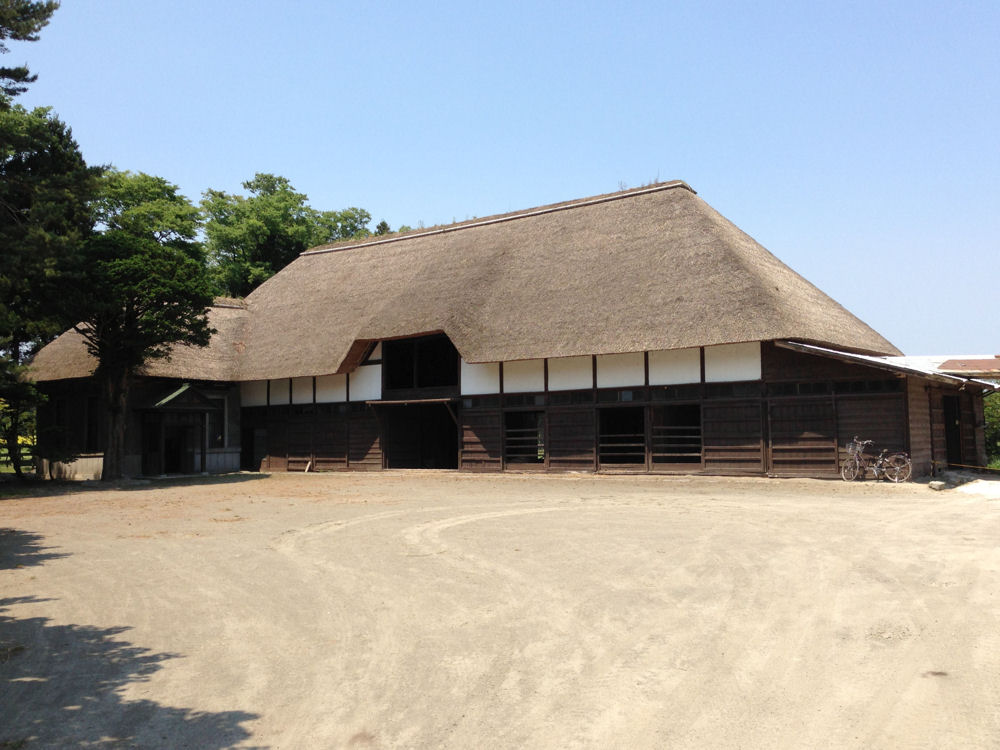 盛田牧場1号厩舎